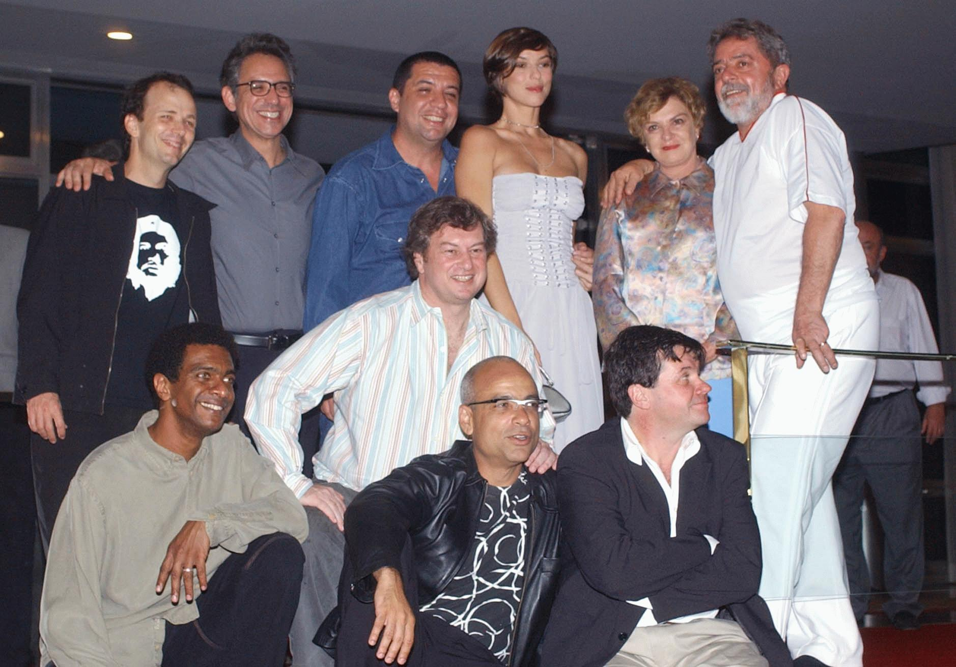 Brasília - Presidente Lula e D. Marisa posam com o grupo Casseta e Planeta